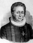 Portrett av professor Stener Johannes Stenersen